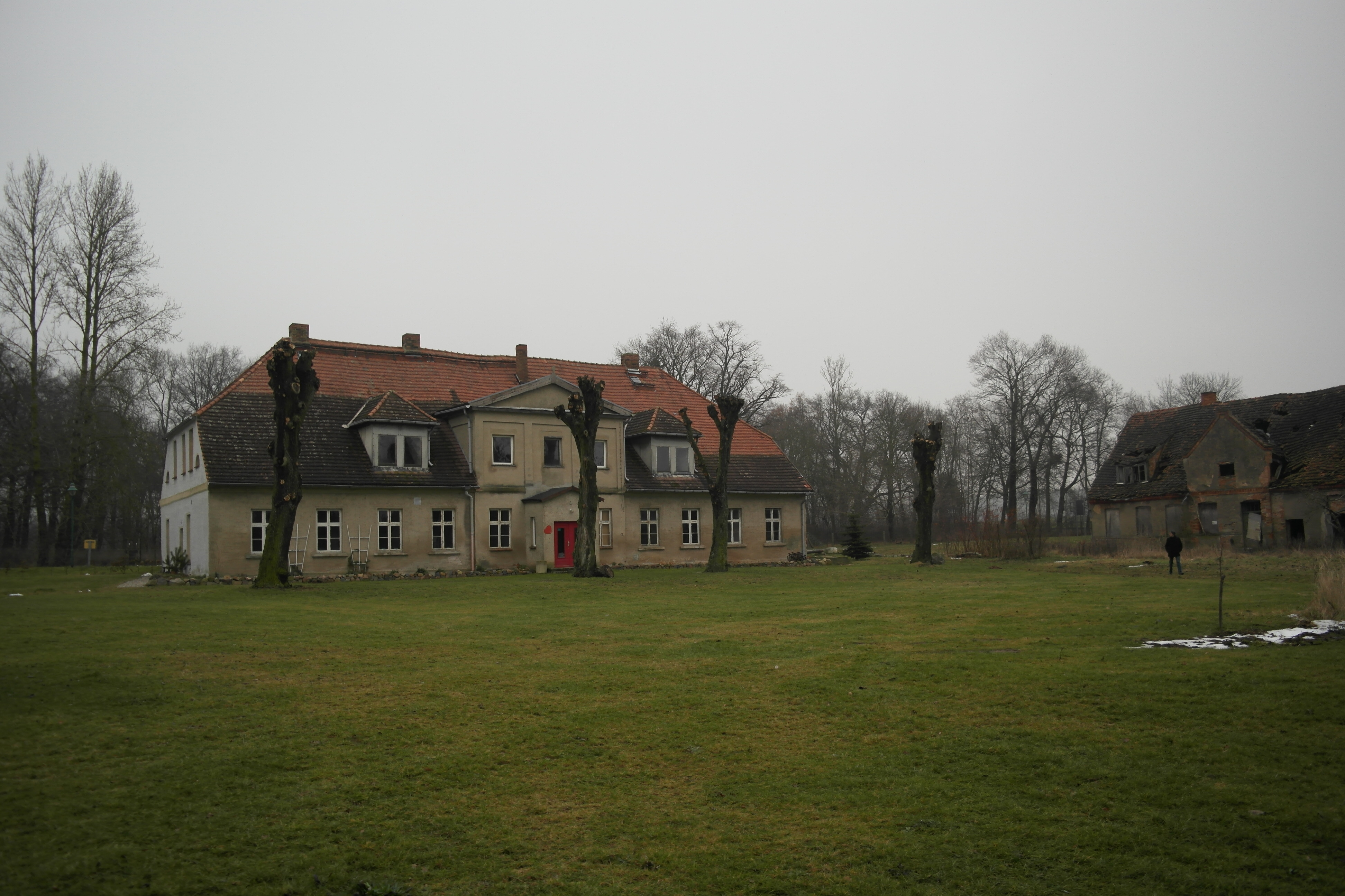 Buschhof, Gemeinde Schwarz bei Mirow, denkmalgeschütztes Gutshaus